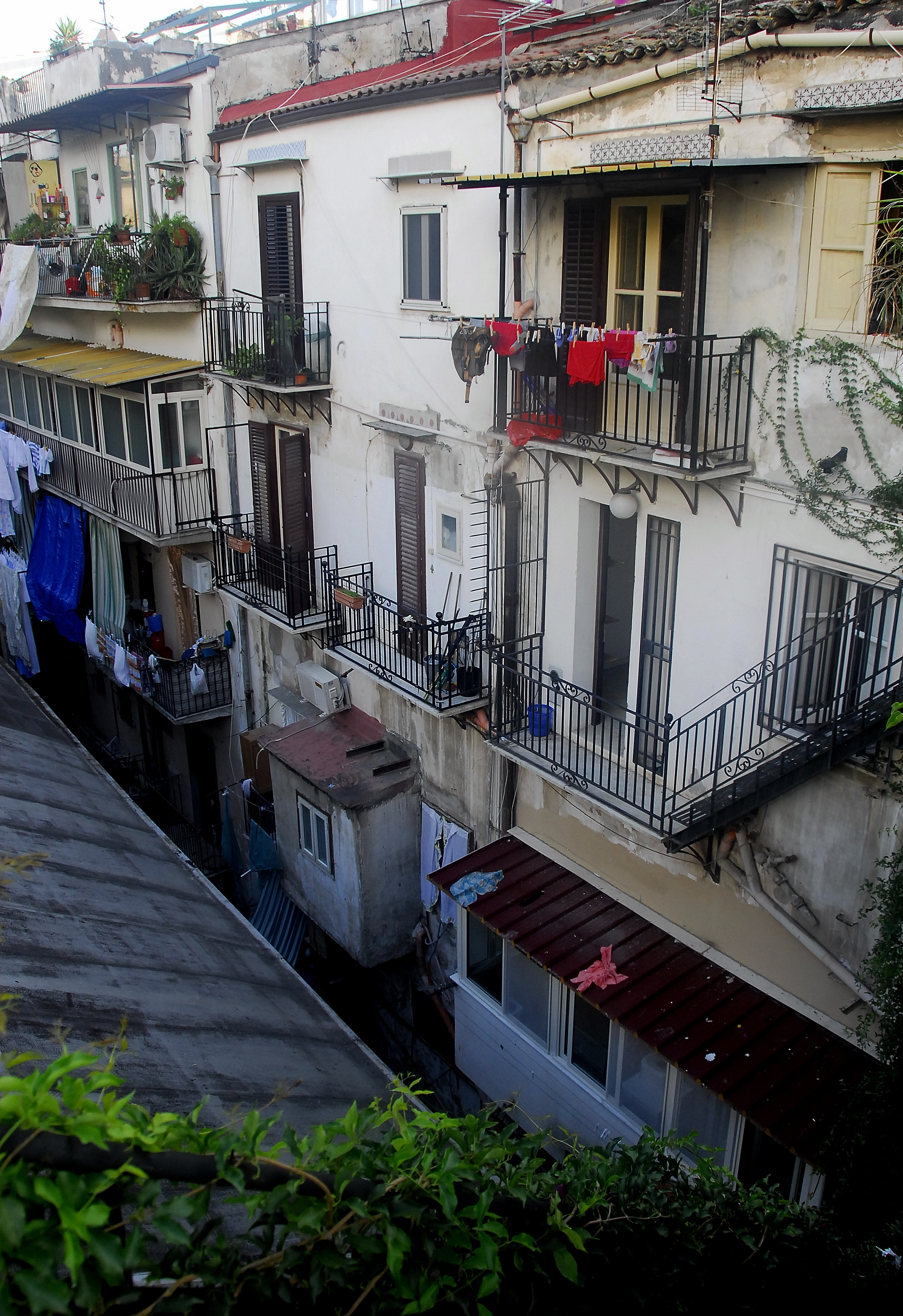 Palermo, ITA